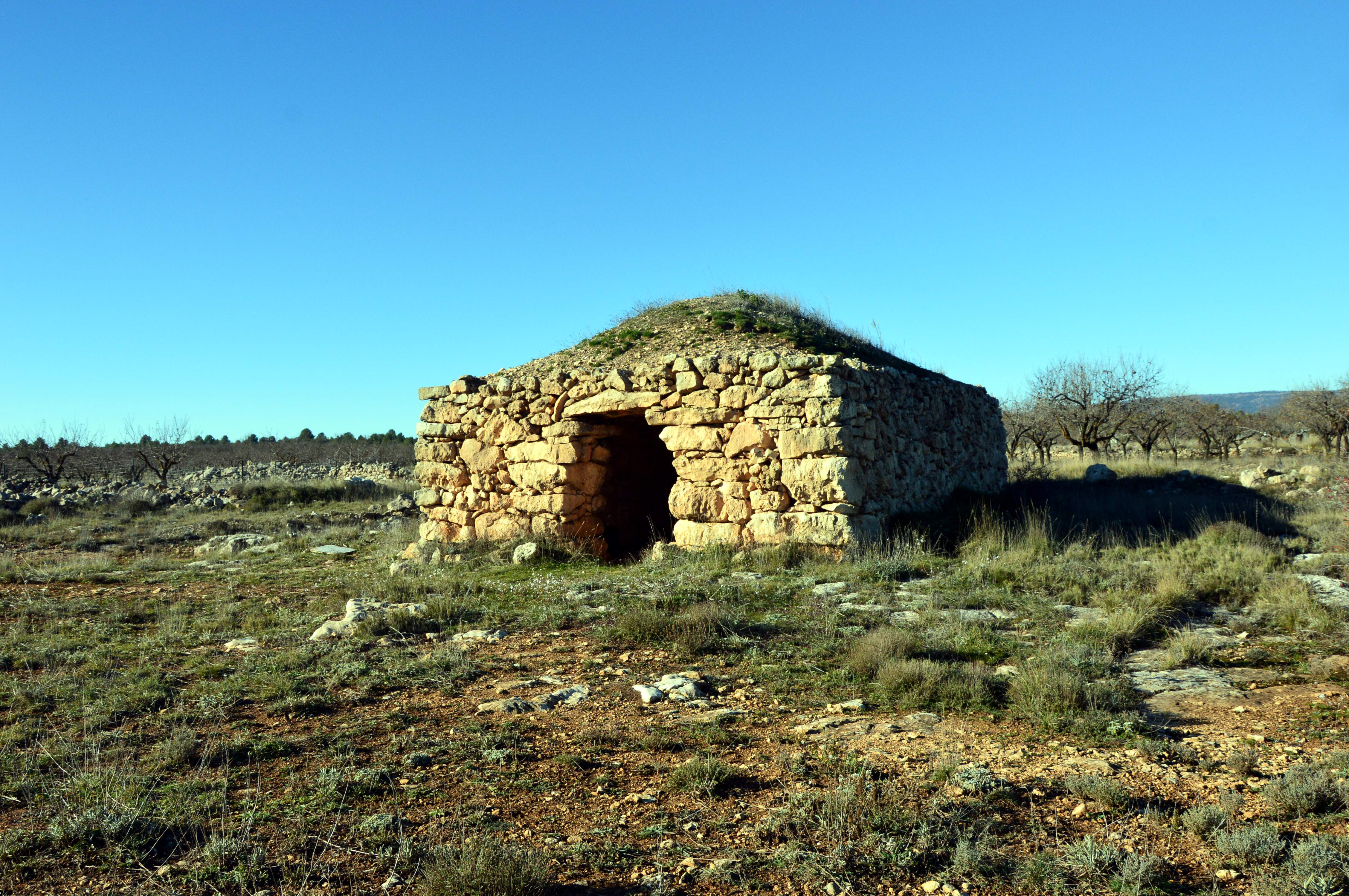 Vista fronto-lateral derecha (nororiental) de la Barraca Grande del Pinar (Casasbajas, Valencia), 2018.